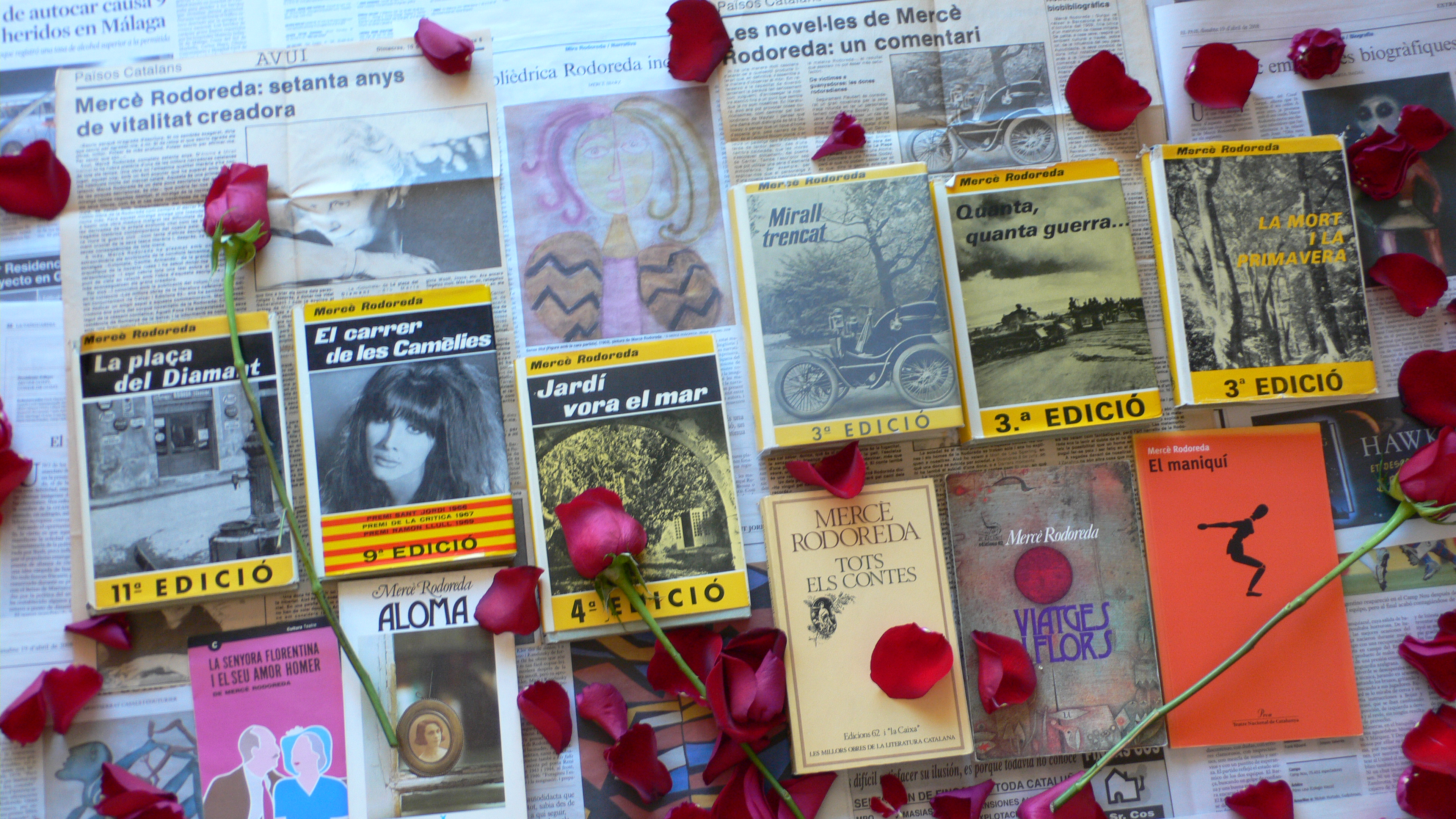 Conjunt de llibres publicats per l'autor, juntament amb retalls de diaris i demés sobre l'autora.